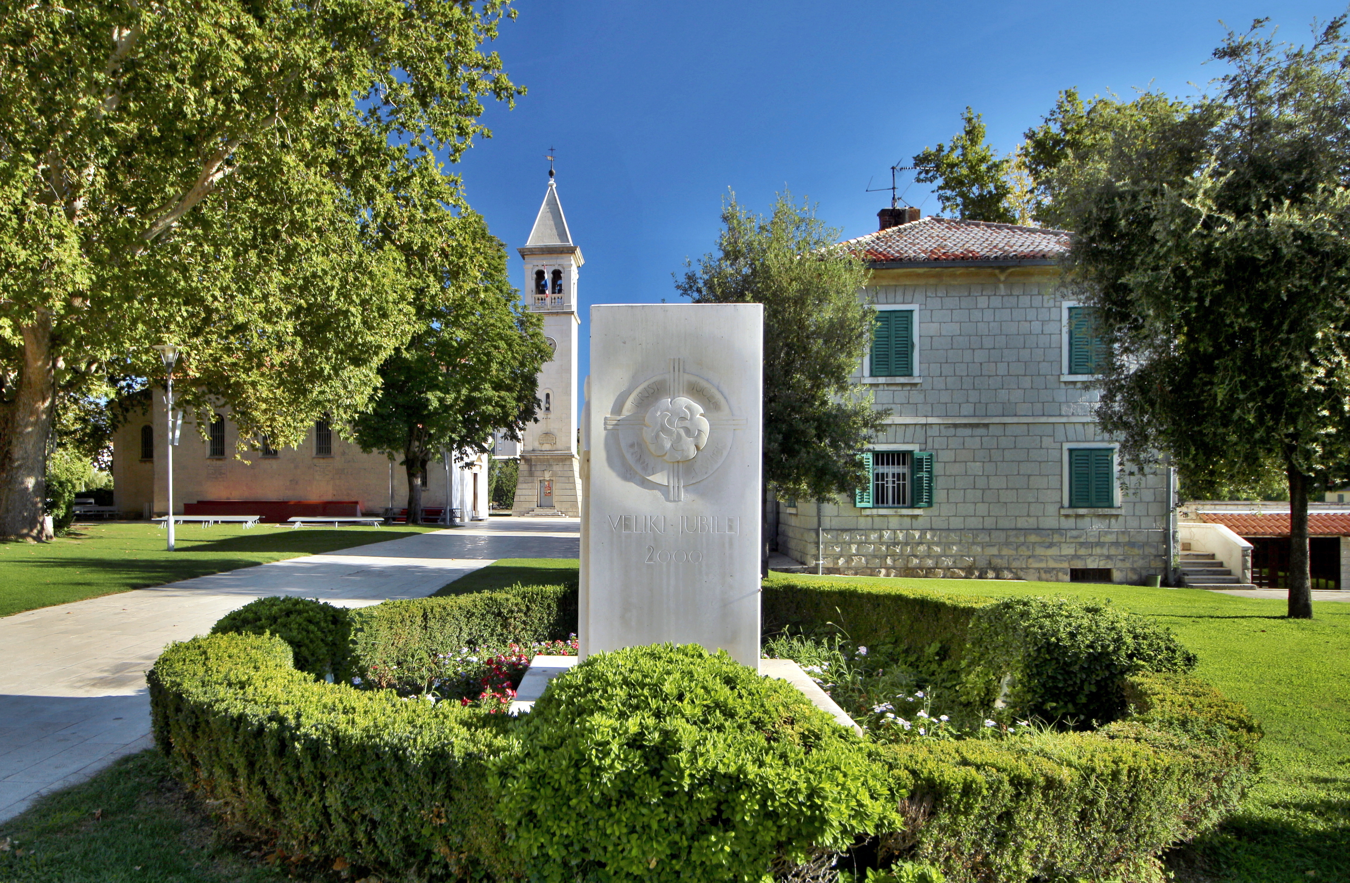 Město Solin u Splitu